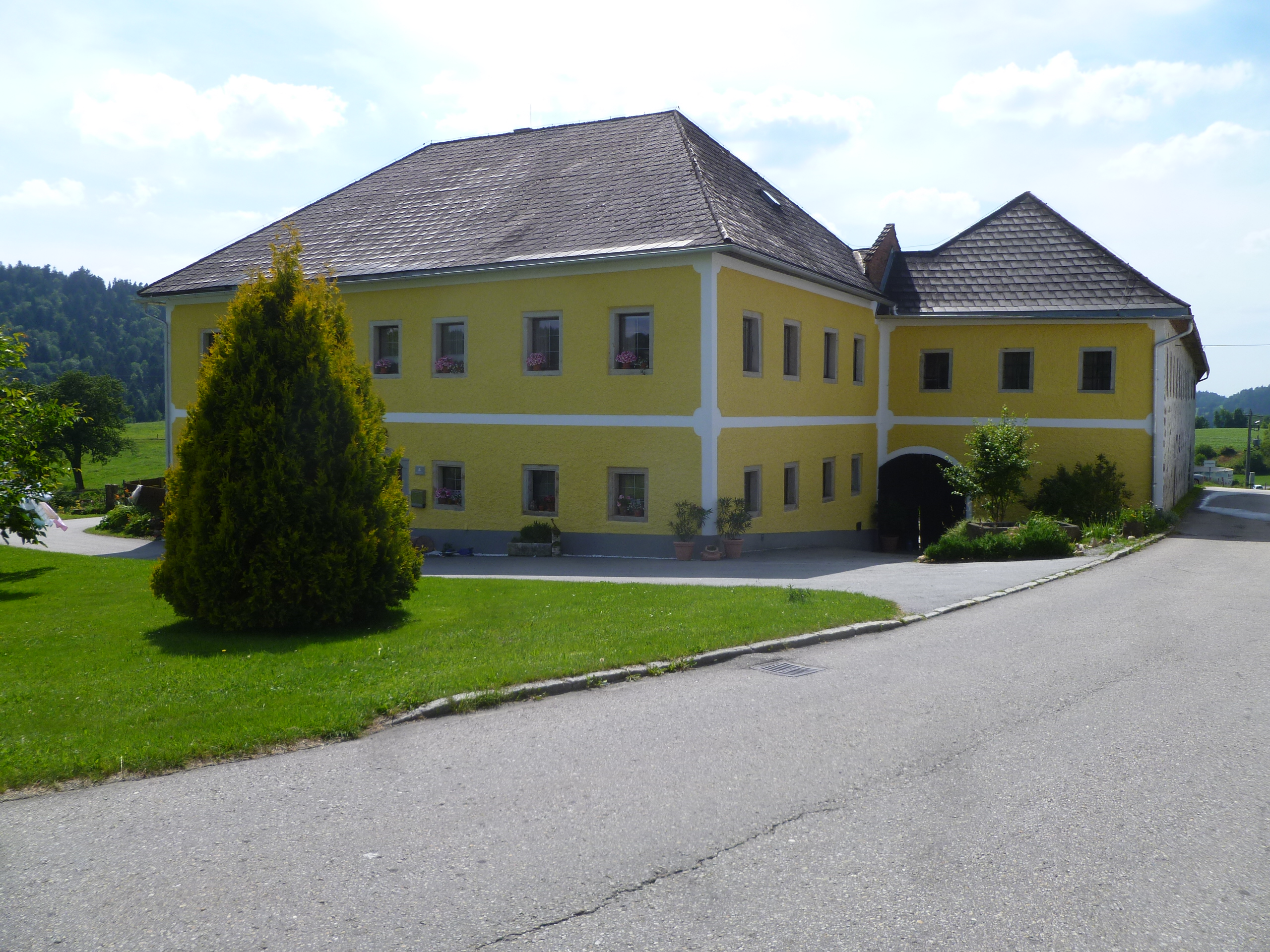 Schöffgattern